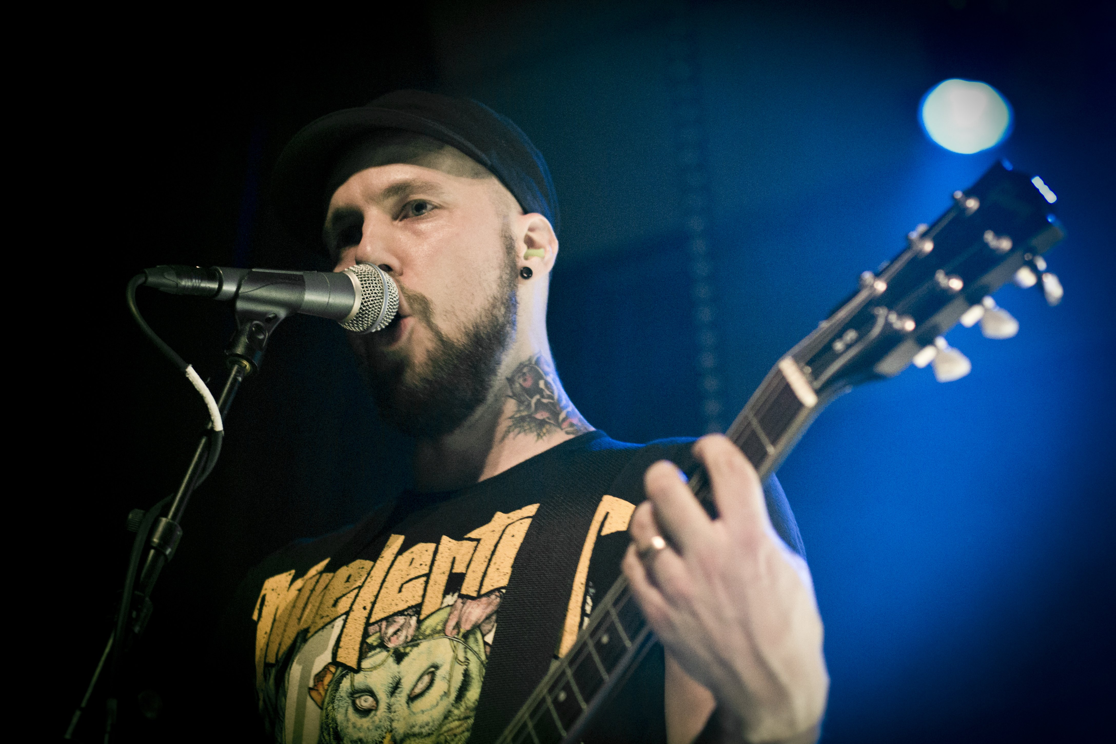 Le groupe de grindcore Exhale aux Elements of Rock 2012.